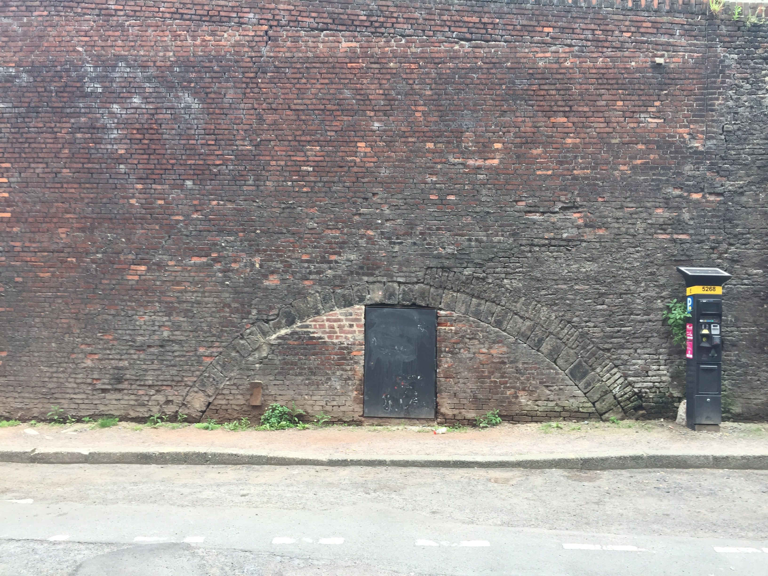 Ancienne voute du canal des Vieux Hommes dans la courtine de la porte de Roubaix.